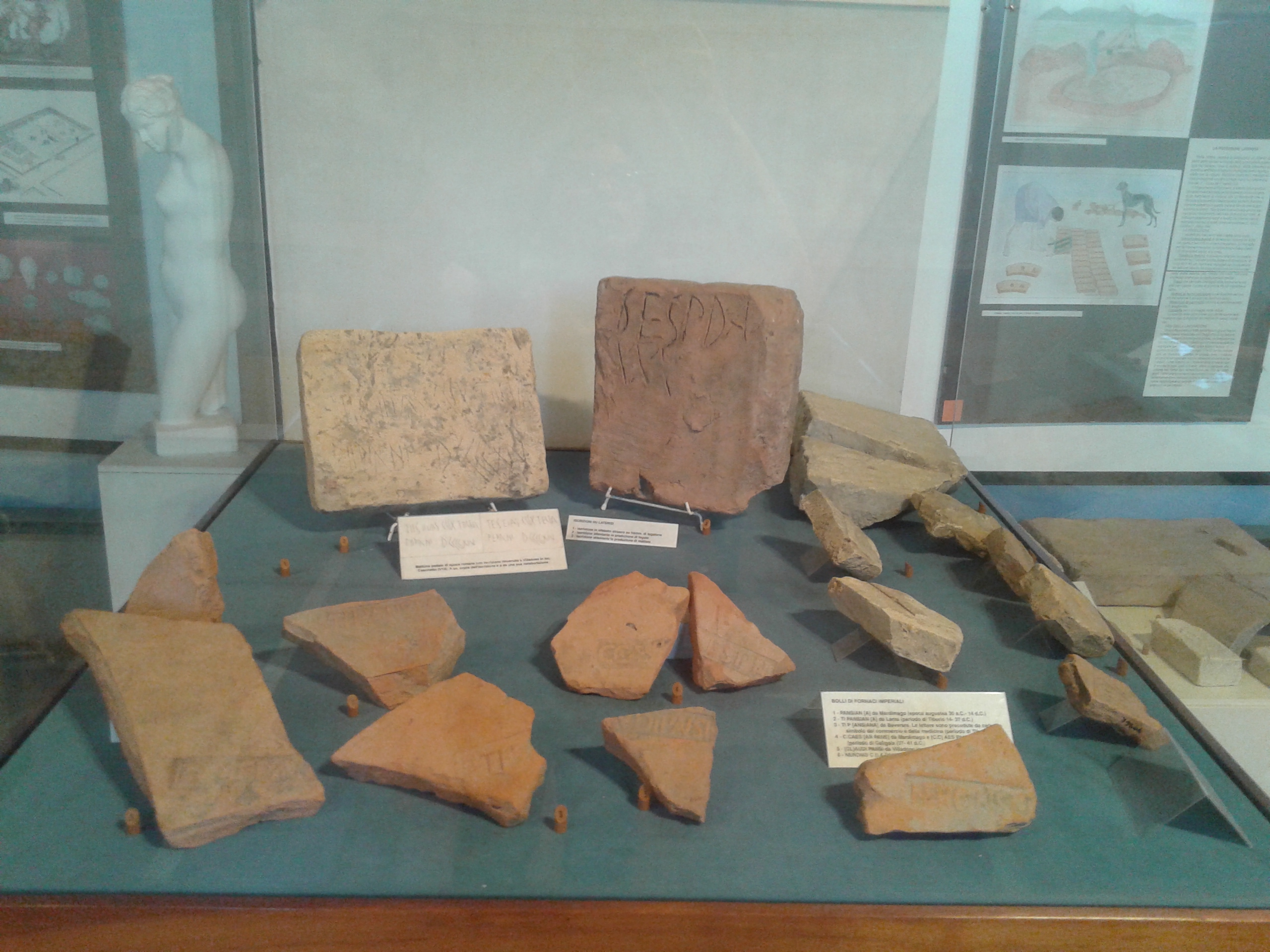 Incisioni che indicano l'orientamento della centuriazione nei siti dell'area centuriata